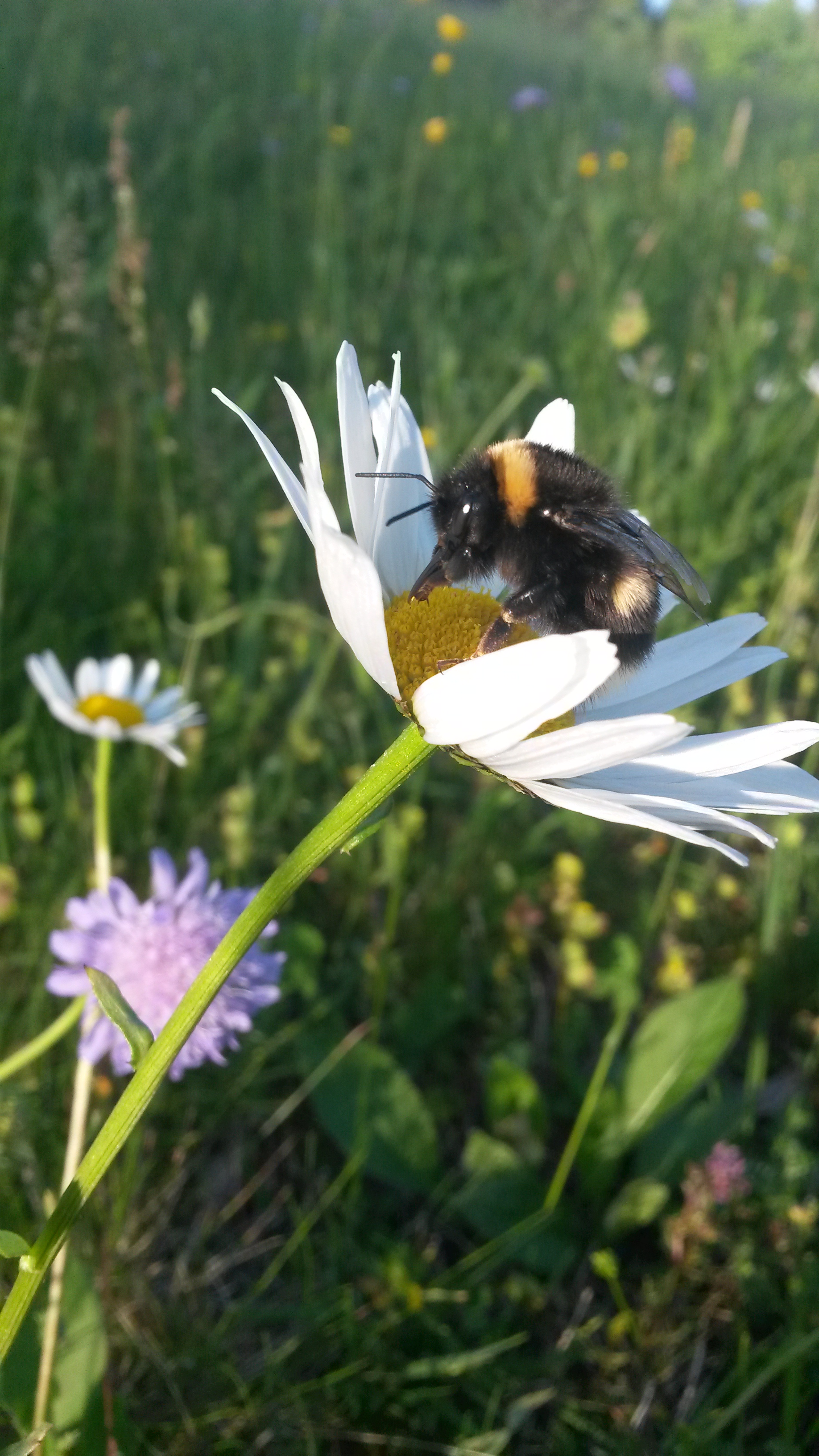 Dunkle Erdhummel auf Magerwiesen-Magerite